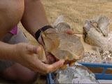 Patrick Bringmans: eigen foto